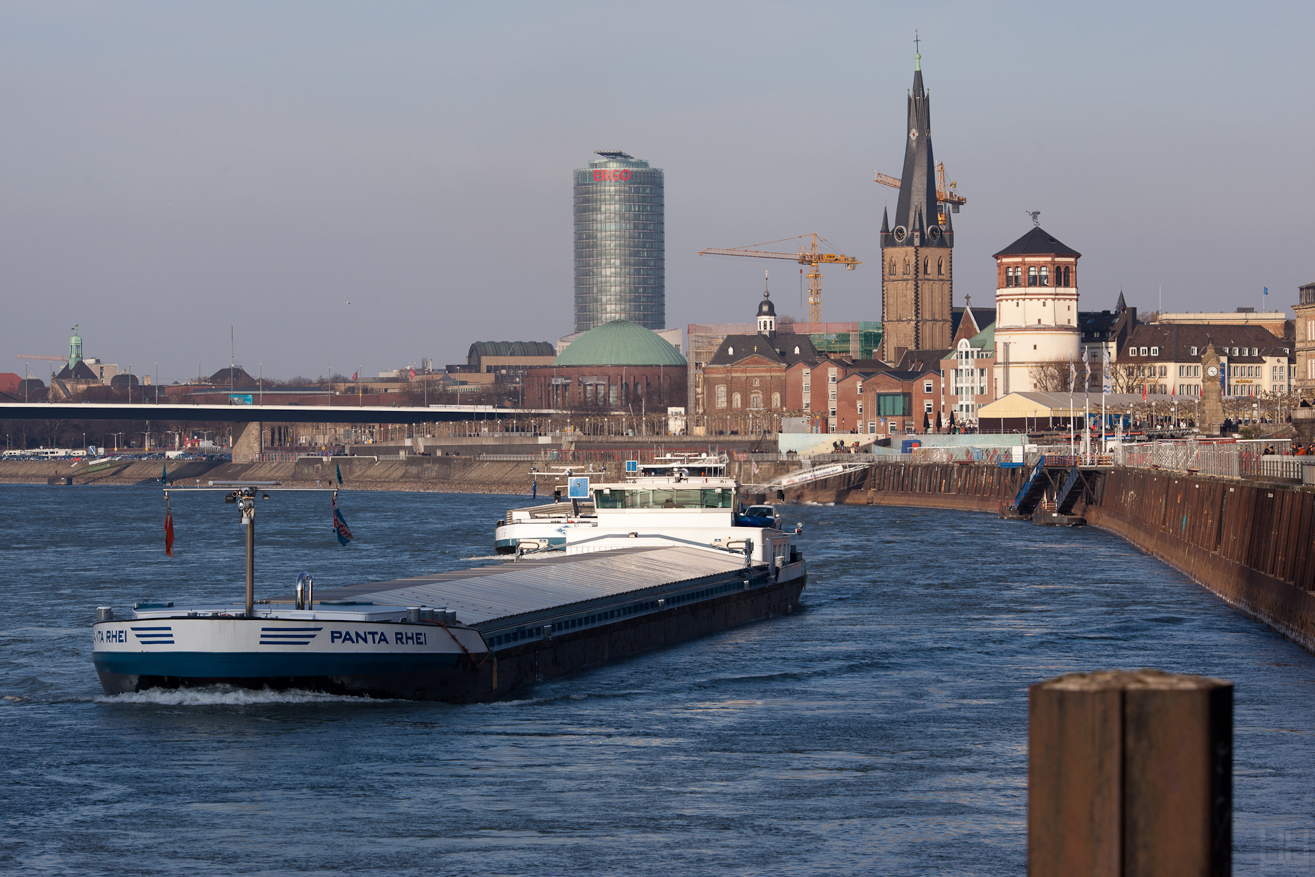 Düsseldorf